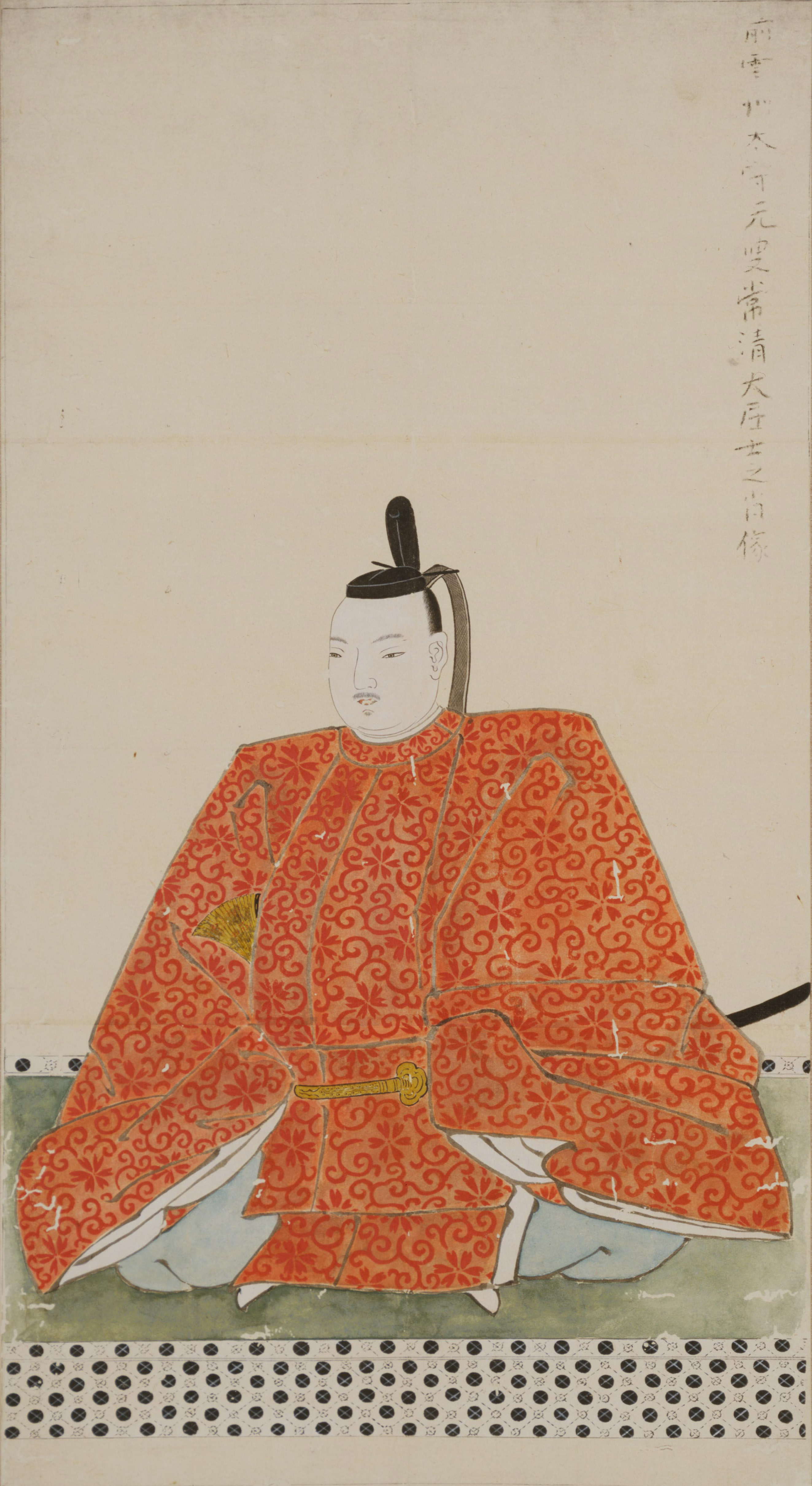 来島通総の肖像。